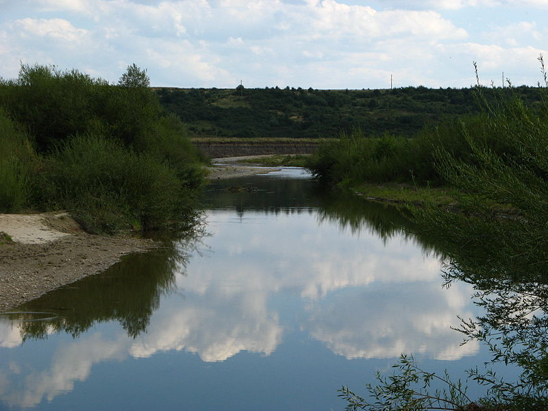 Плёс на речке Вигор